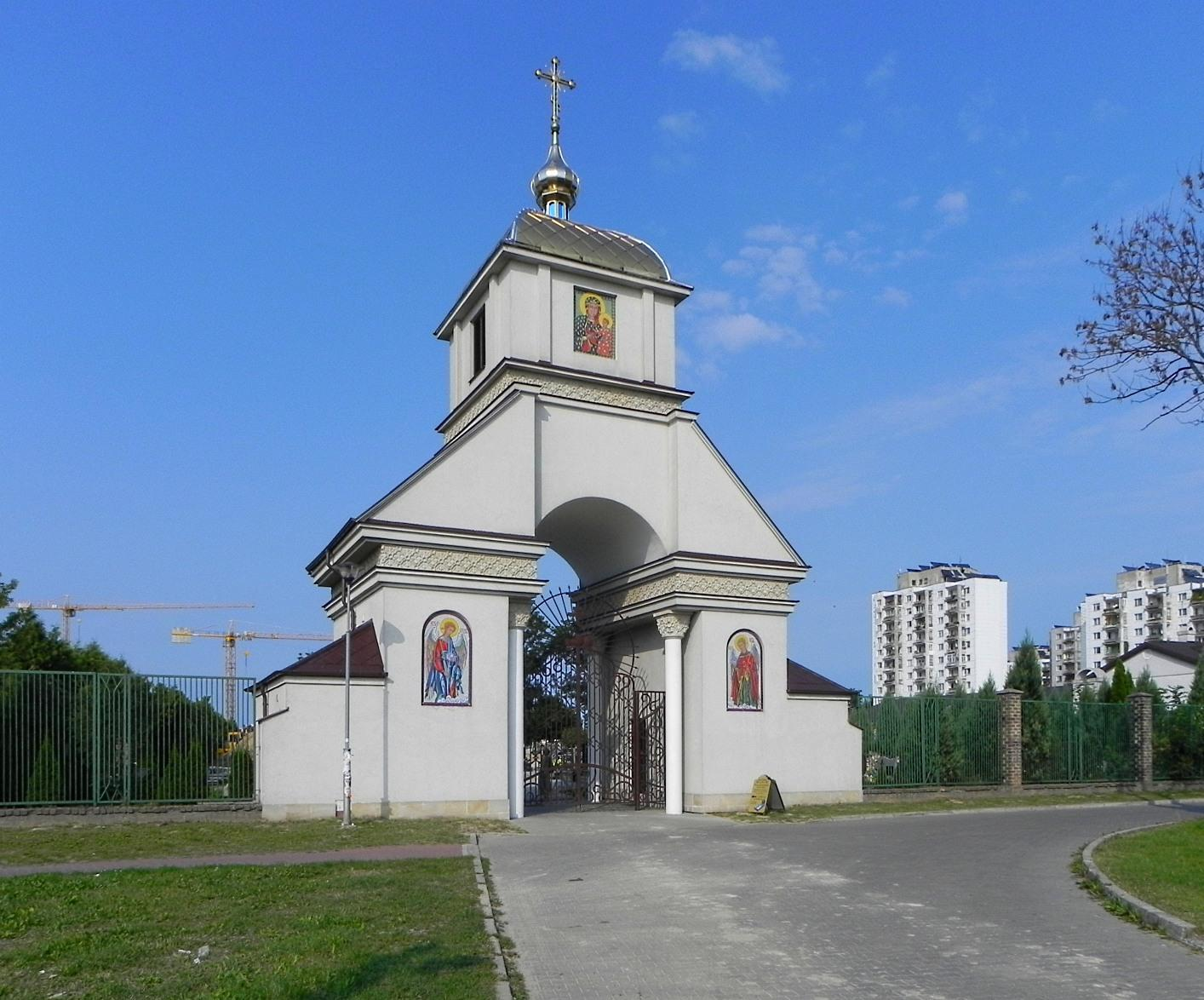 Dzwonnica i brama wejściowa na cmentarz prawosławny przy ulicy Bołtucia 26. W tle, po lewej widoczne żurawie na budowie Pałacu Sprawiedliwości czyli nowej siedziby Sądu Okręgowego i Rejonowego.